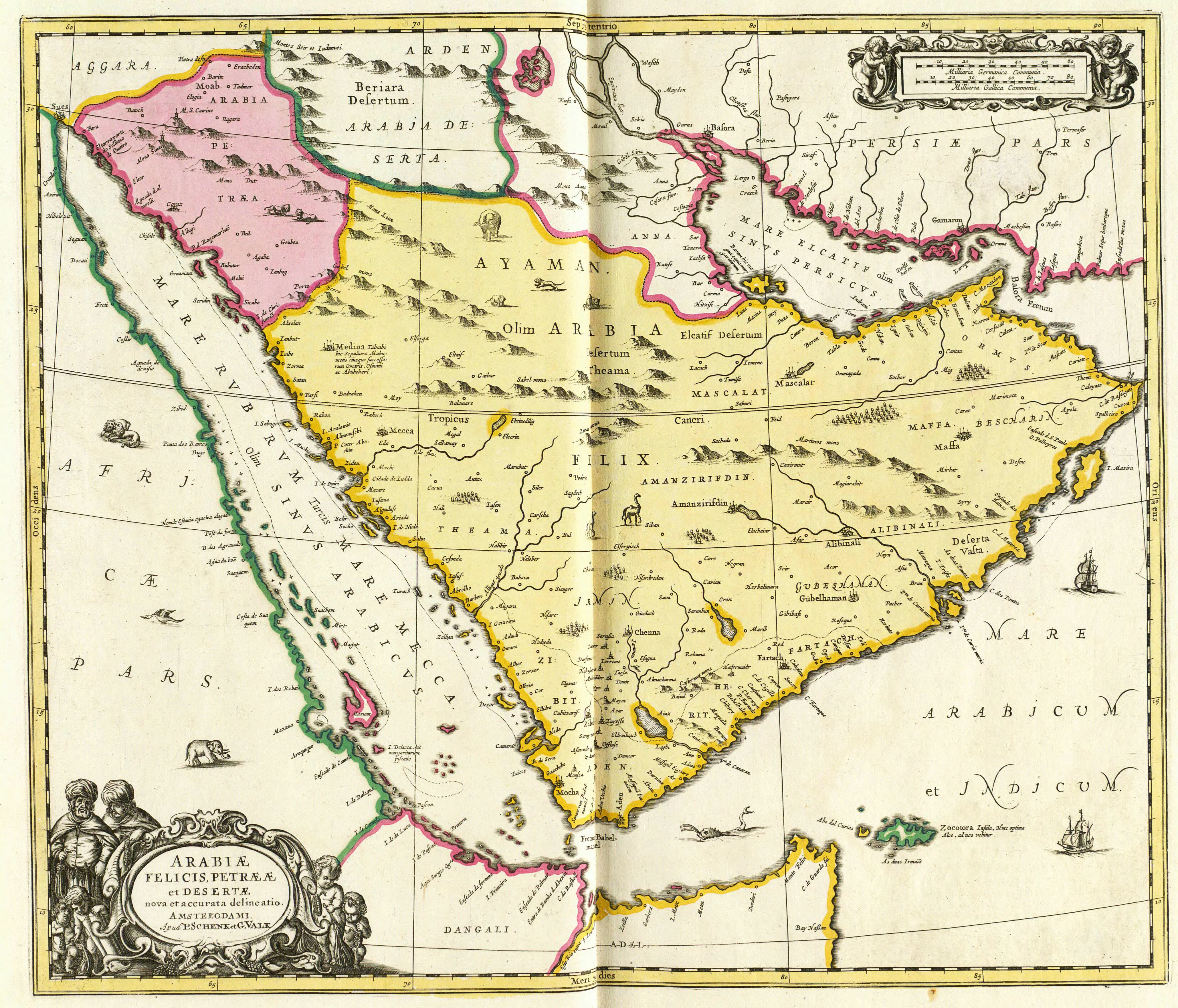 Arabiæ Felicis Petræ æ et Desertæ nova et ...